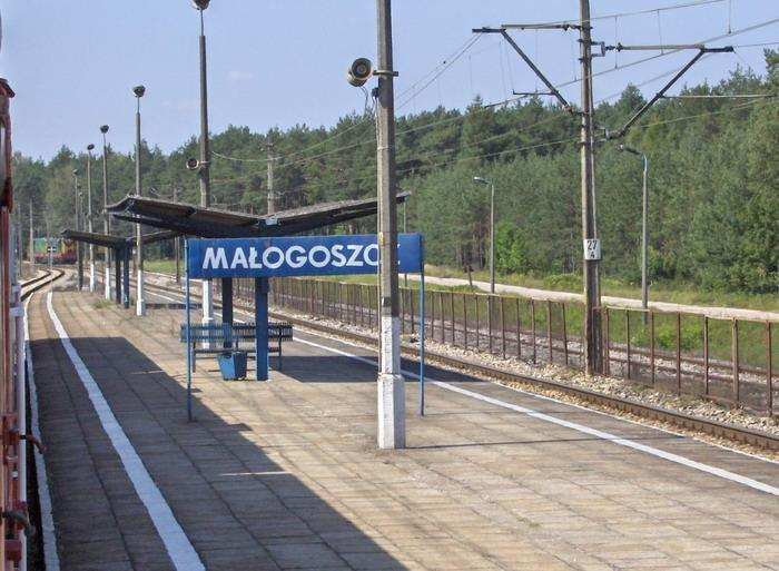 Widok na peron stacji kolejowej Małogoszcz